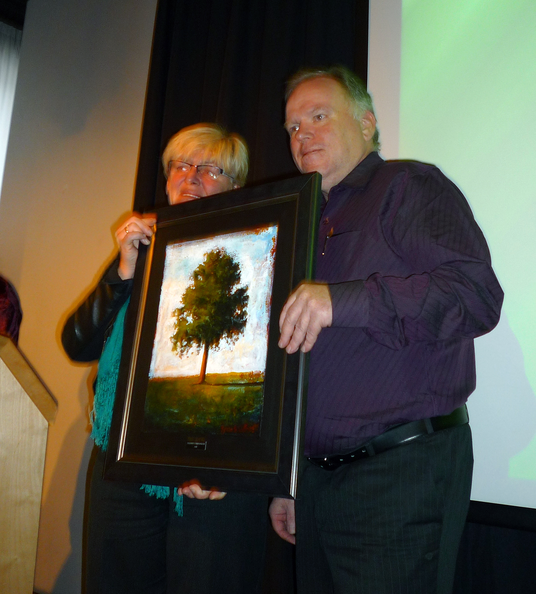 Norsk (bokmål): Wikimedia Norge tildelt Folkeopplysningsprisen 2011. Anne Grethe Klunderud overrekker Folkeopplysningsprisen til styreleder Jarle Vines i Wikimedia Norge